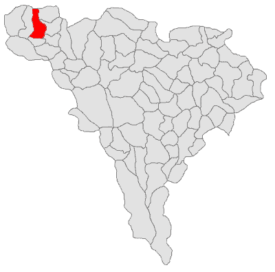 Categorie:Hărţi ale judeţului Alba